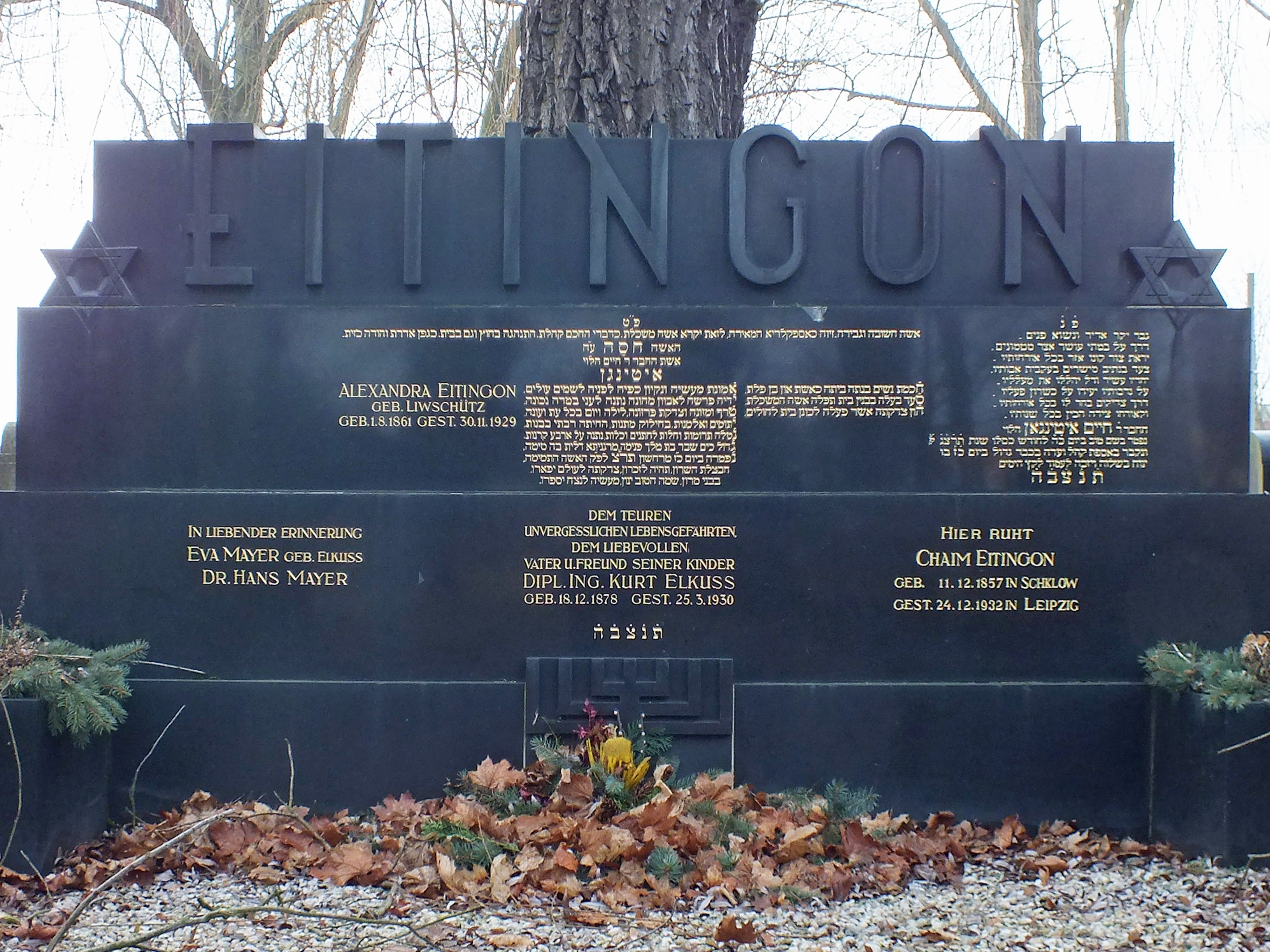 Neuer Israelitischer Friedhof in Leipzig, Familiengrab Eitingon